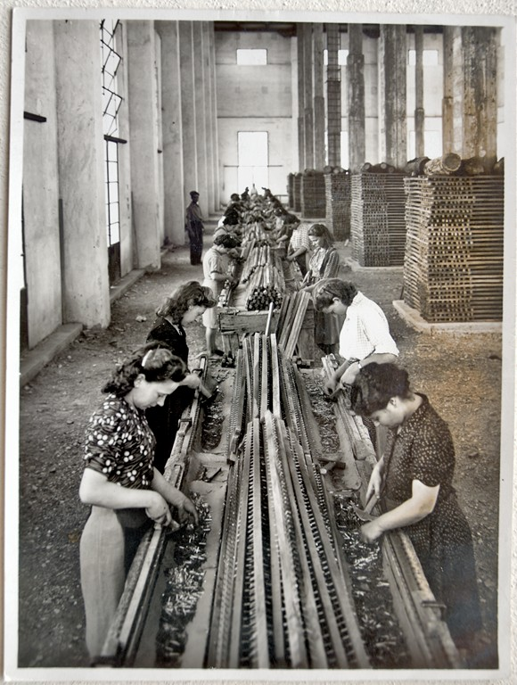 Operaie del tabacchificio Centola di Pontecagnano (AS Salerno, Intendenza di Finanza, Danni di guerra, SAIM B1, fasc. 12, 1944)